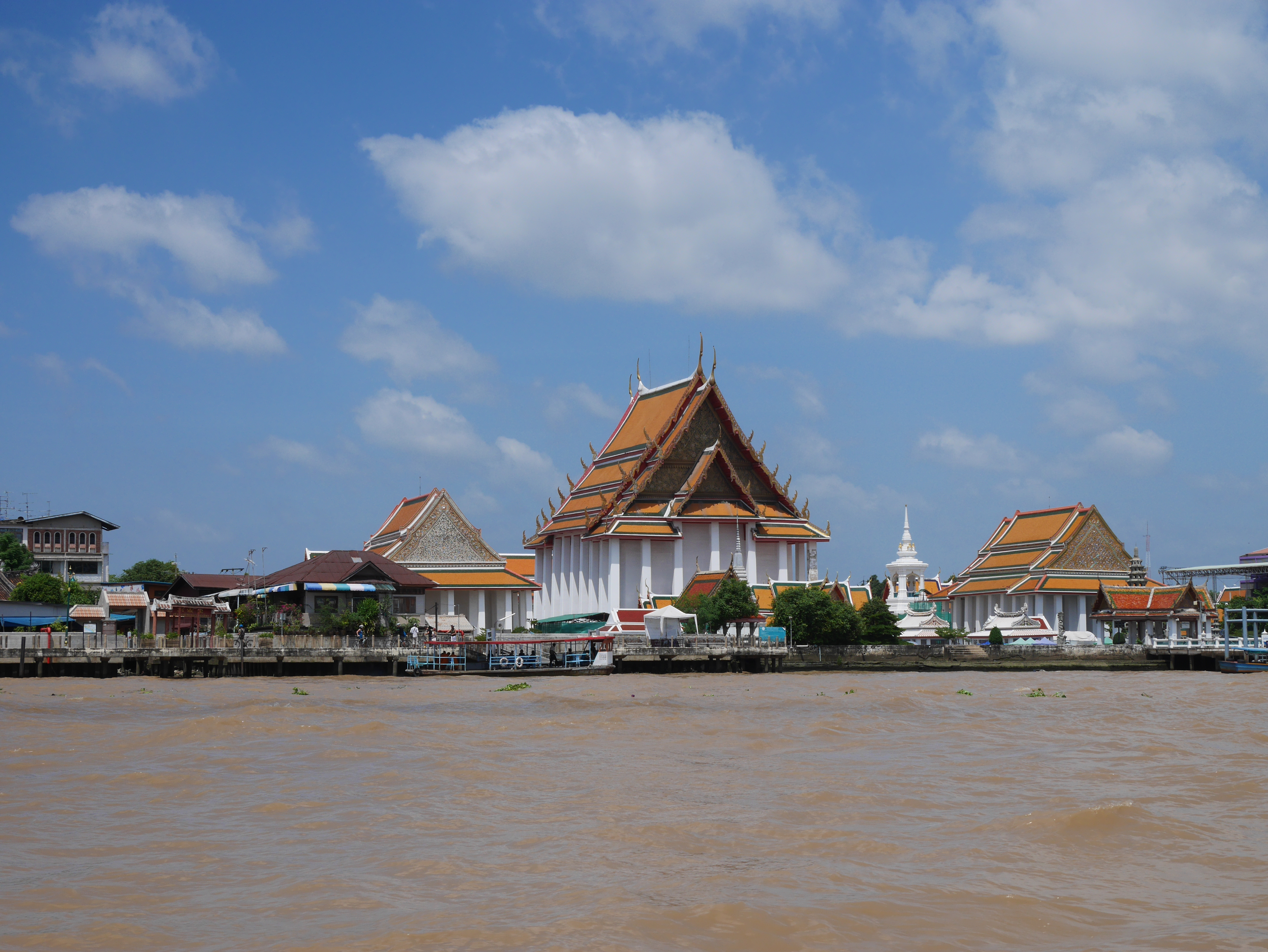 วัดกัลยาณมิตร